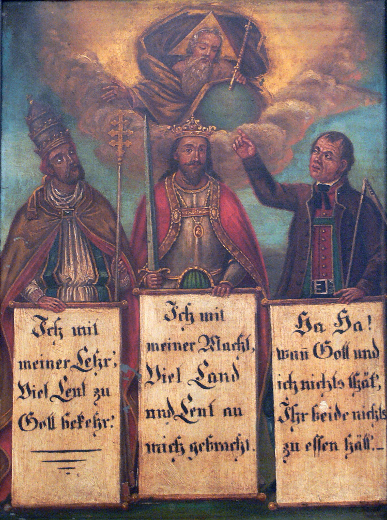 Die drei Stände, Tirol um 1800 Wien, Österreichisches Museum für Volkskunde